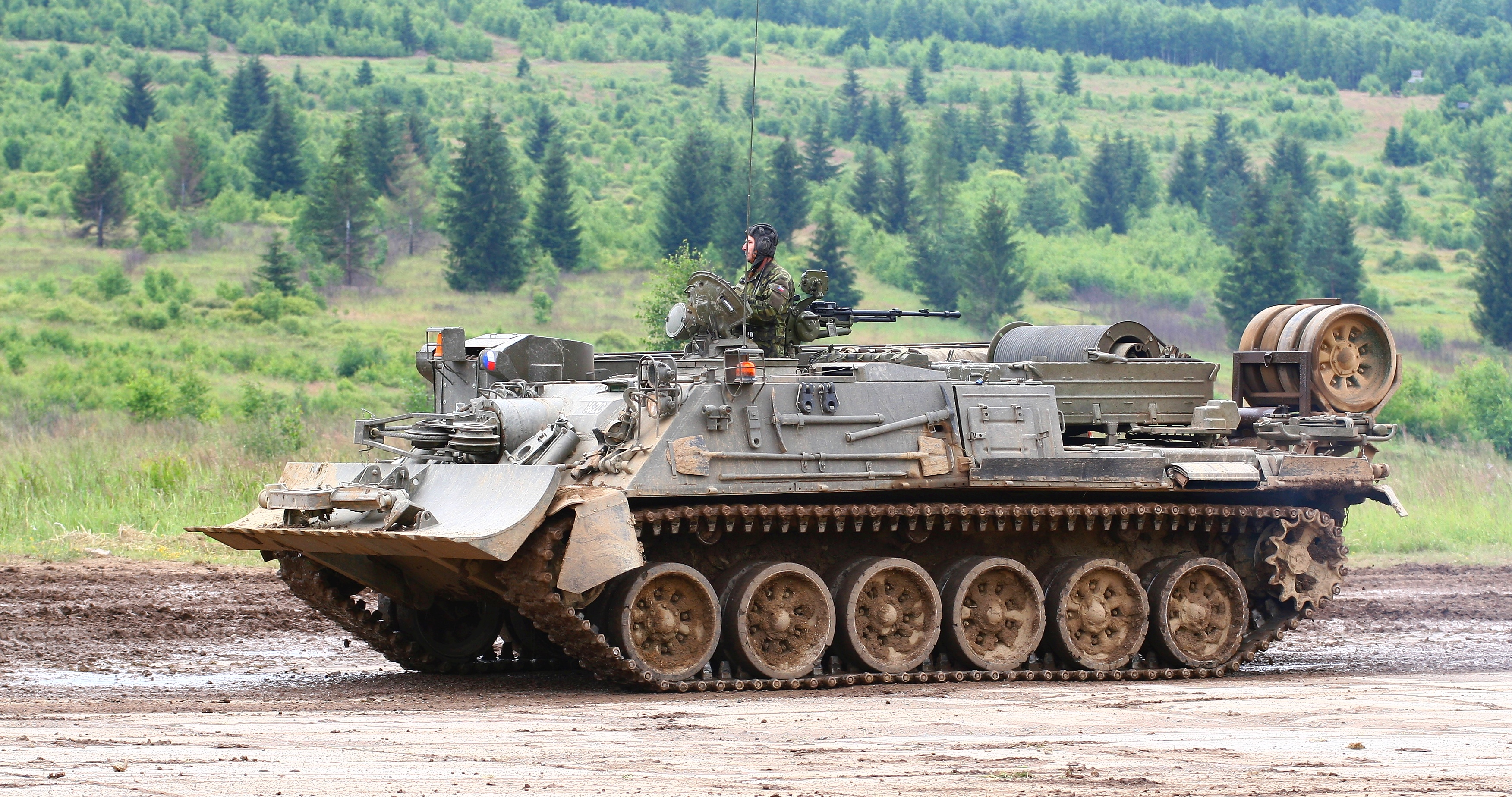 Vojenská technika zaznamenaná při dynamických ukázkách na Dni pozemního vojska BAHNA 2018, který pořádá Velitel společných sil a Nadace pozemního vojska AČR.